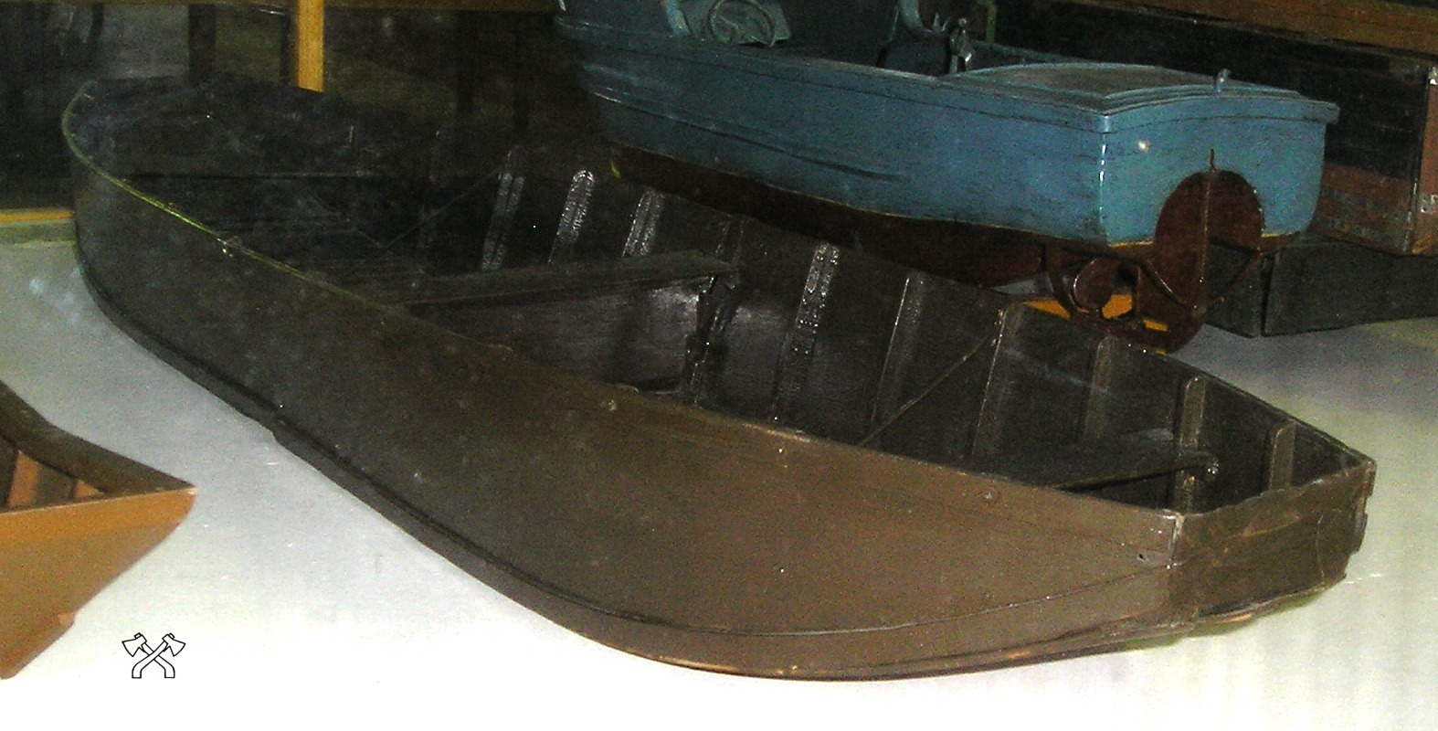 ДСЛ